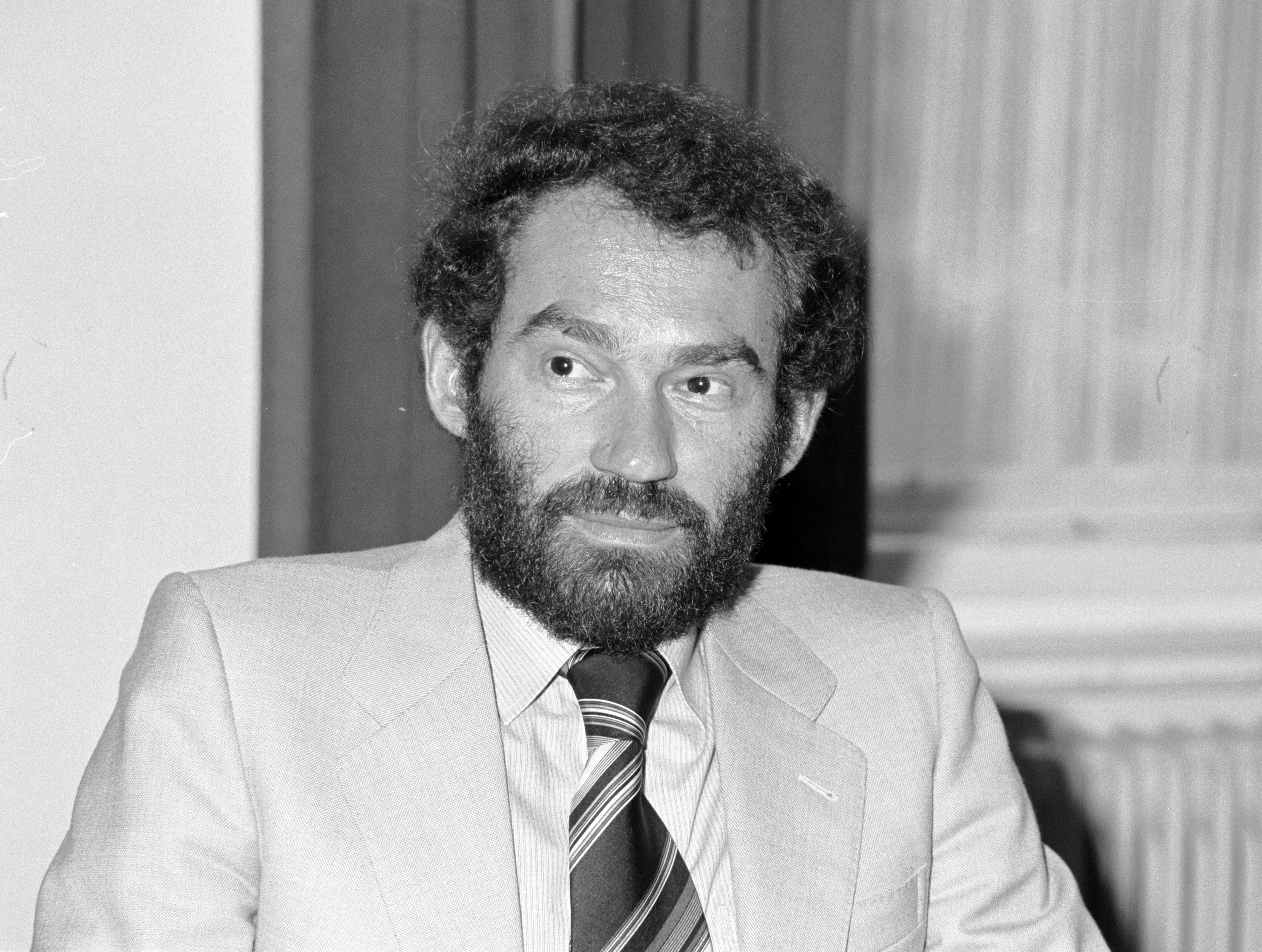 Oswald Ölz bei der Verleihung des Sportlerehrenzeichens des Landes Vorarlberg